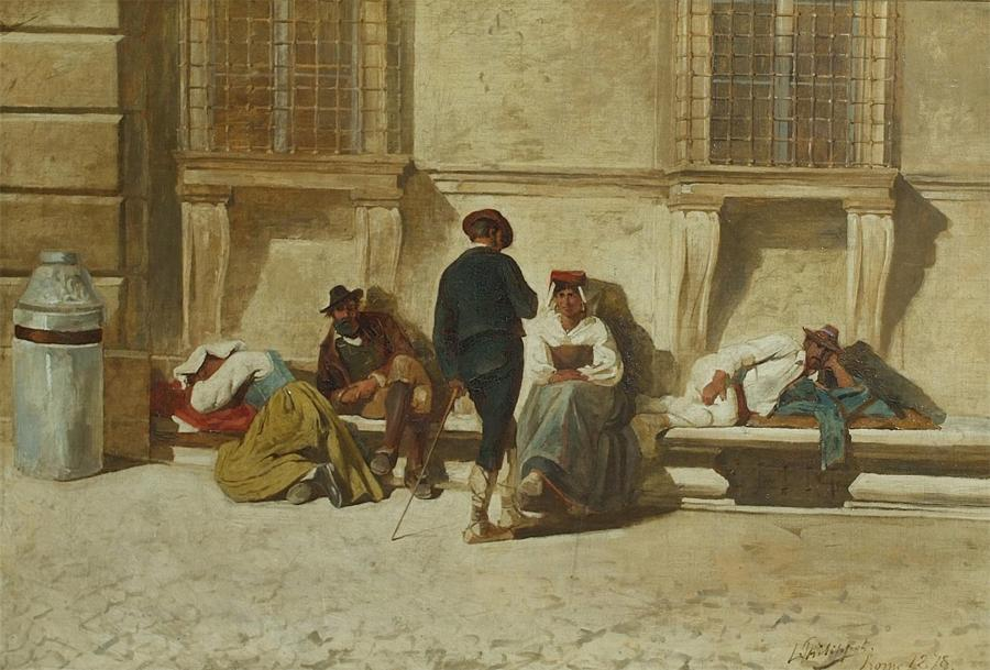 Scène de rue à Rome